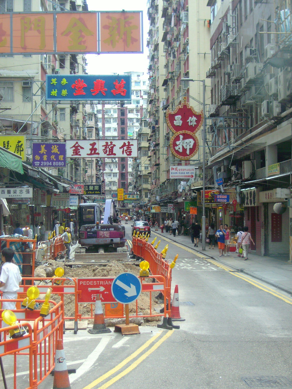 中文（中国大陆）: 香港土瓜灣美景街由渠务署在维修。